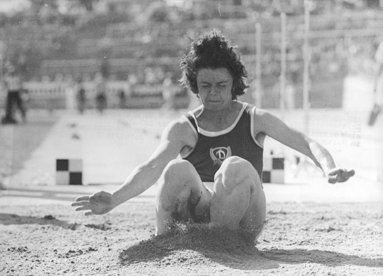 Brigitte Künzel ADN-ZB Kluge 3.7.77 Dresden: DDR-Leichtathletik-Meisterschaften. 4. Tag. Mit ausgezeichneten 6,87 m erkämpfte sich Brigitte Künzel (SC Dynamo Berlin) den DDR-Meistertitel im Weitsprung und verfehlte den Weltrekord nur um 12 Zentimeter.